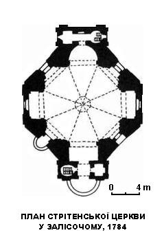 Олика. План Стрітенської церкви, 1784